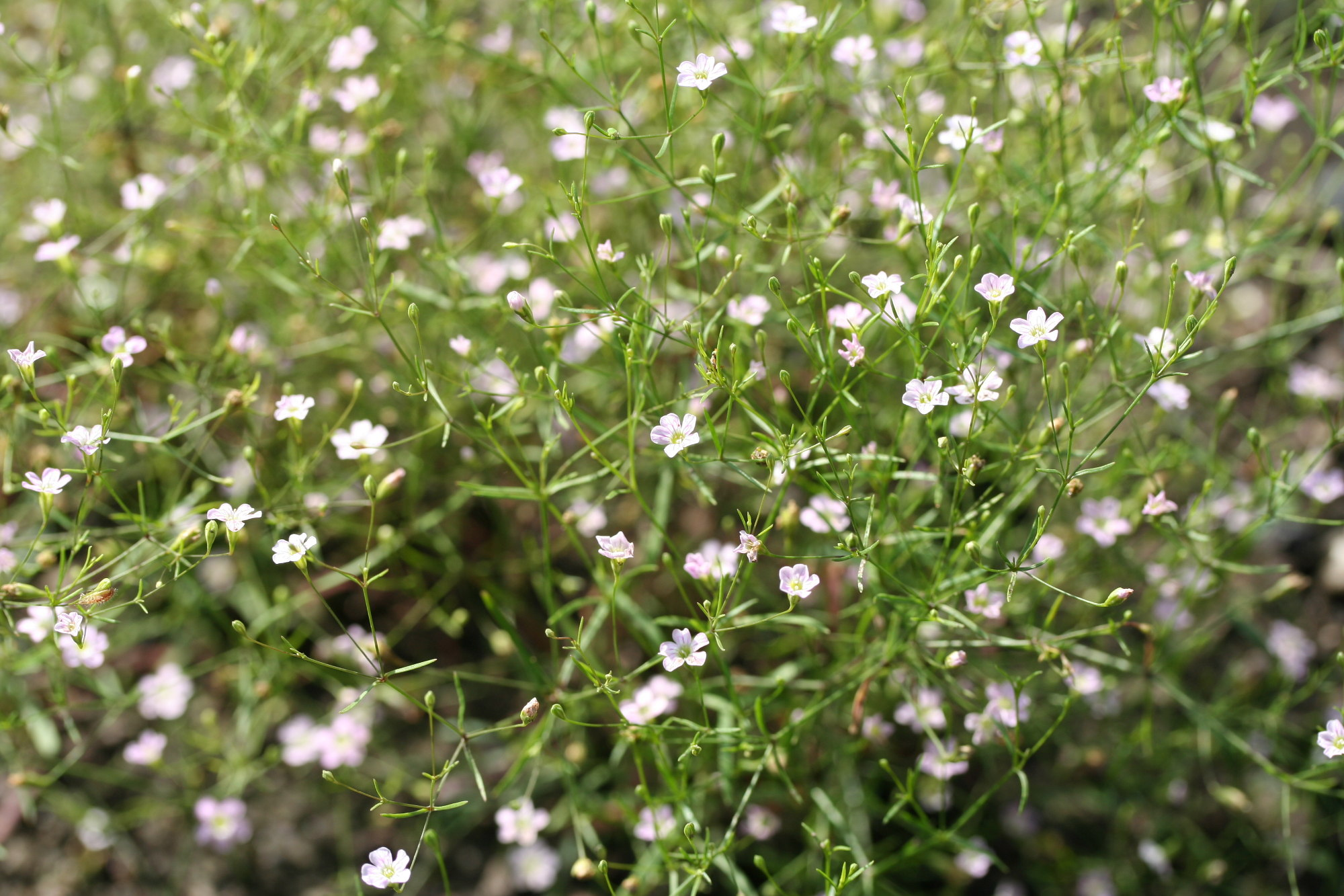 Gypsophila muralis im Botanischen Garten Dresden